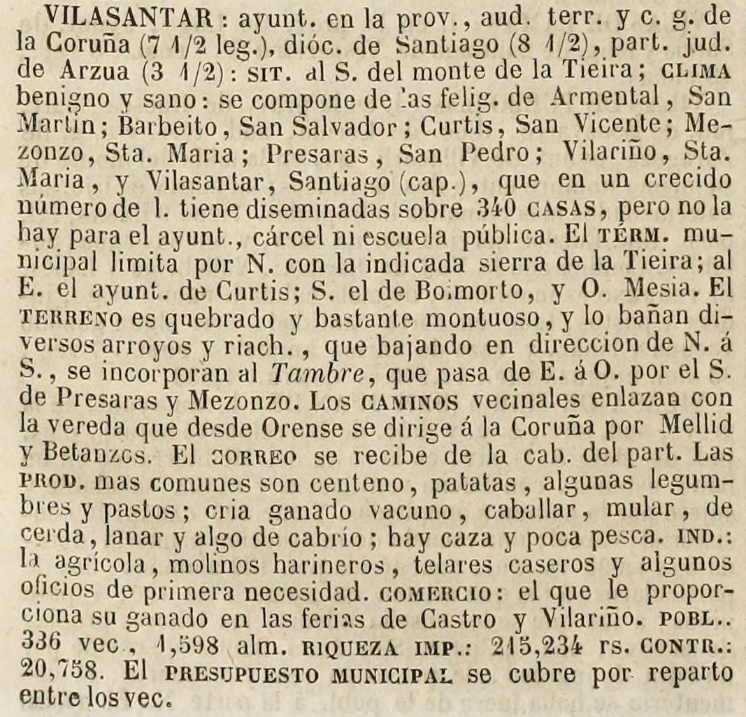 Concello de Vilasantar no Diccionario geográfico-estadístico-histórico de España y sus posesiones de Ultramar.